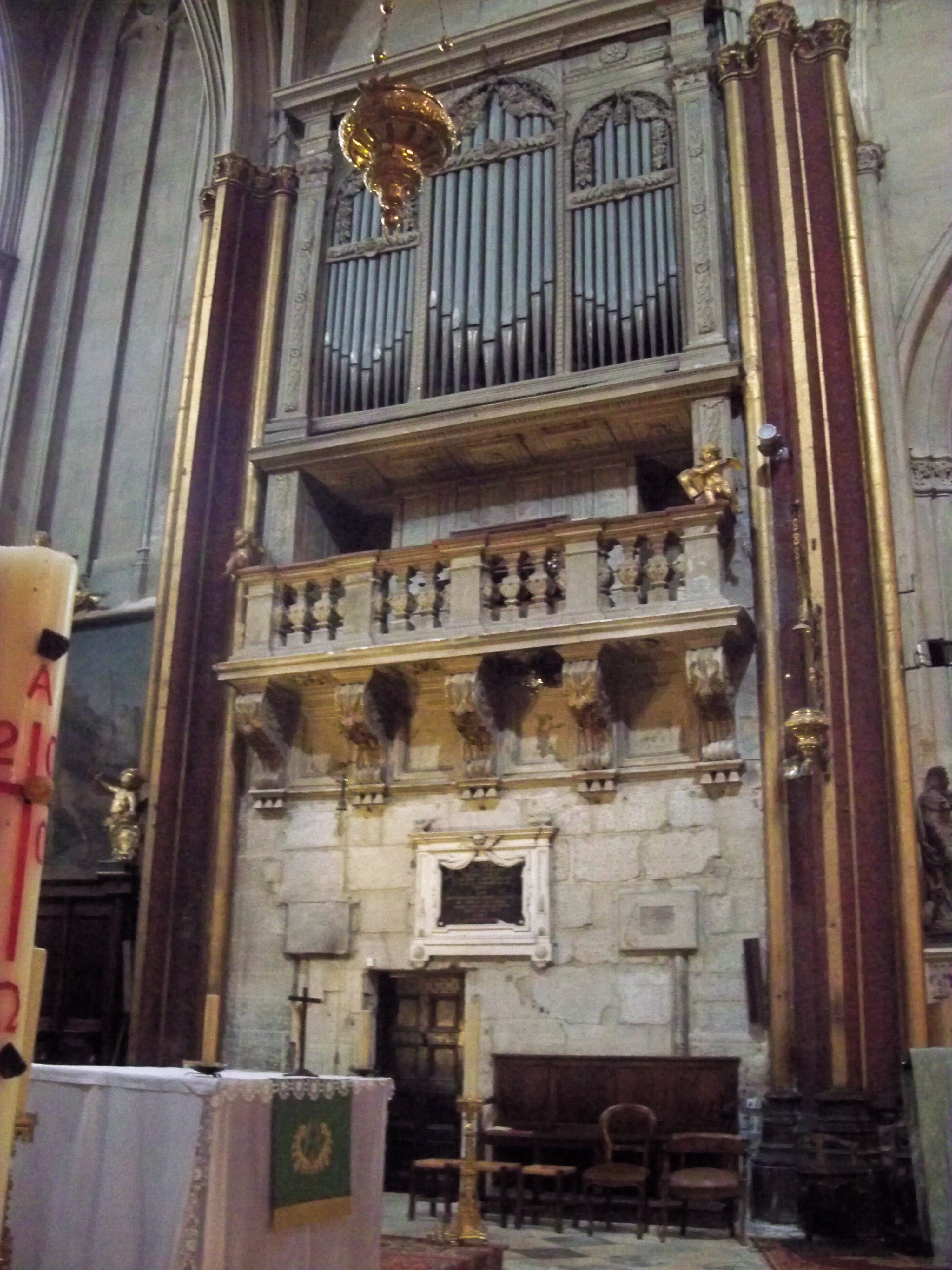 Carpentras (Vaucluse, France), dans la cathédrale Saint Siffrein, côté épître, buffet d'orgue Renaissance, bâti par Jean de Sels & Jacques Perrin et datant de l'orgue de Gaspard & André Eustache de Marseille en 1643; l'instrument ayant été entièrement reconstruit vers 1840 par Daublaine CallinetDaublaine & Callinet , puis modifié par la filiale lyonnaise de Merklin, à l'abandon depuis plus de trente ans, mais parfois utilisé: 5 à 6 jeux du premier clavier fonctionnent encore à peu prés (possibilité de l'entendre ou de le jouer en juin-juillet le vendredi de 11h à 12h, restauration souhaitée; renseignements fournis par l'organiste de la paroisse). Sa réplique muette côté évangile a disparu.